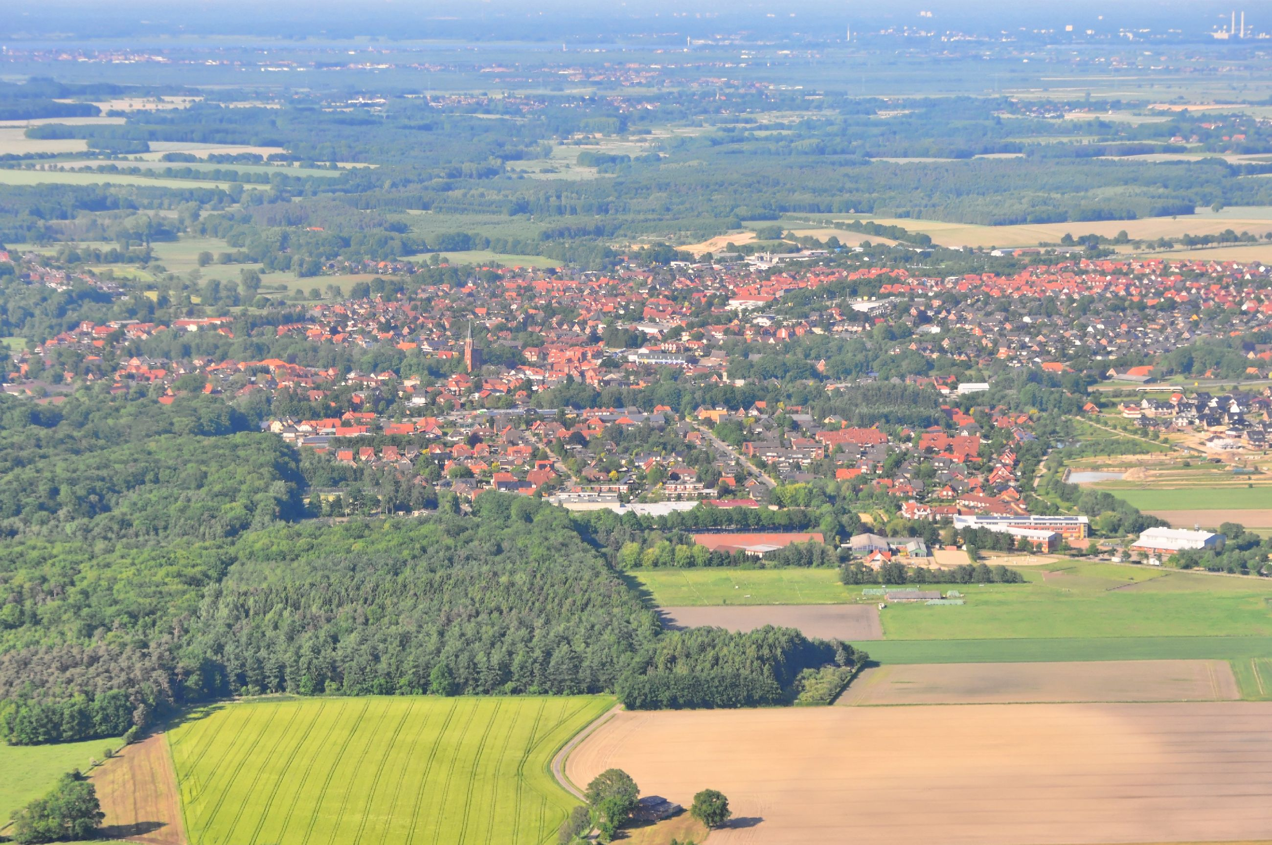 Überführungsflug vom Flugplatz Nordholz-Spieka über Lüneburg, Potsdam zum Flugplatz Schwarzheide-Schipkau